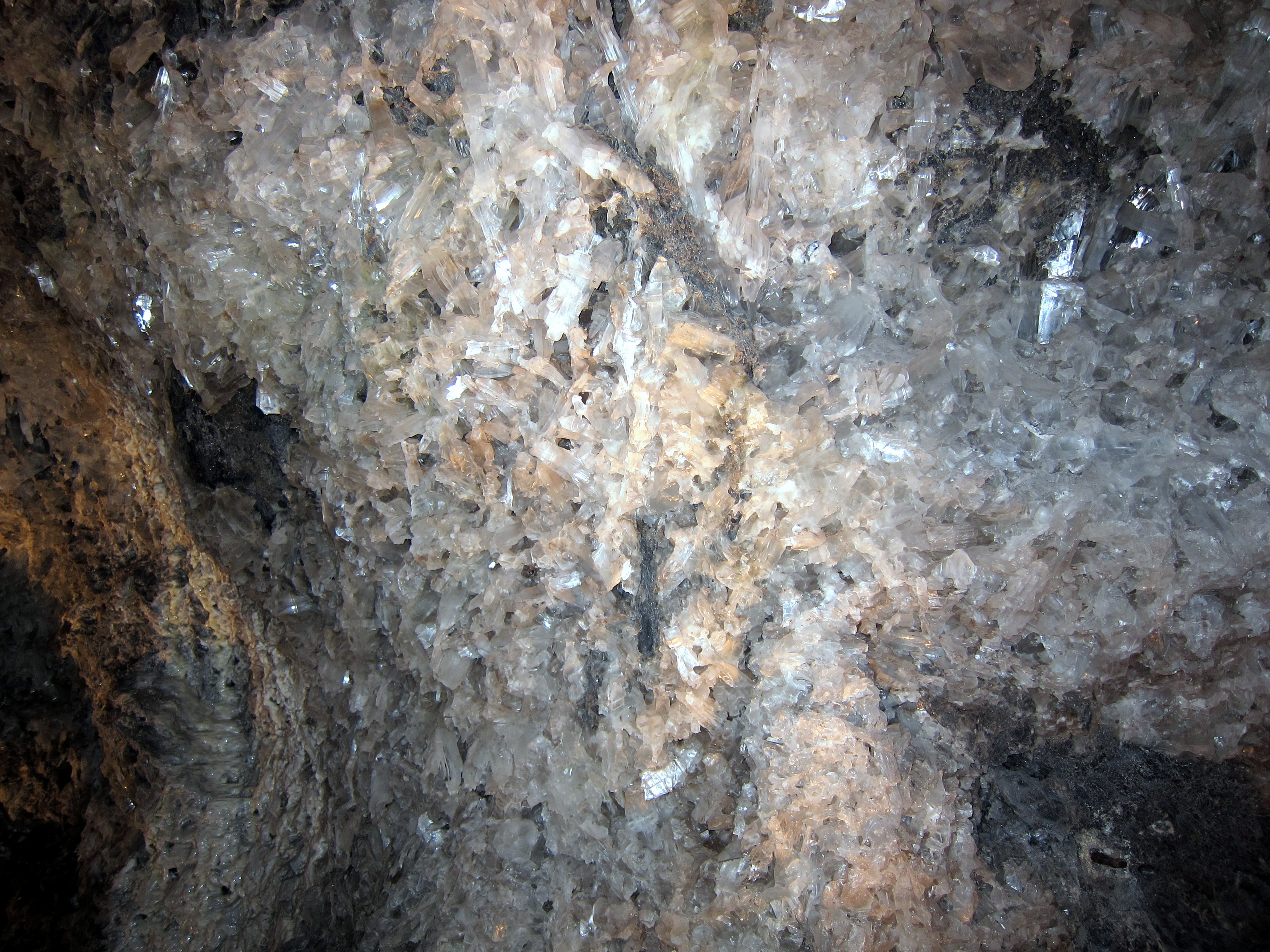 Marienglashöhle